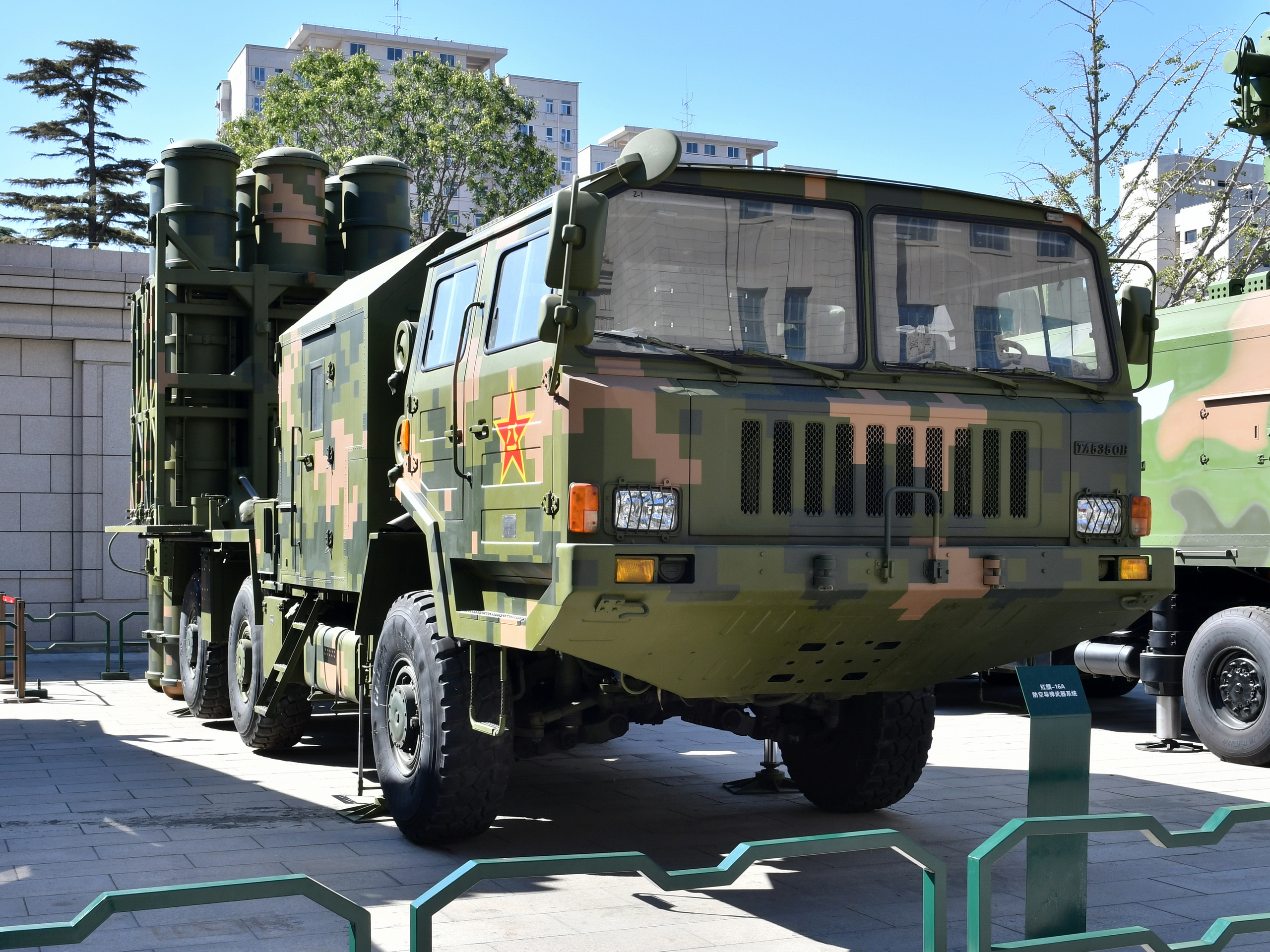 红旗-16A防空导弹